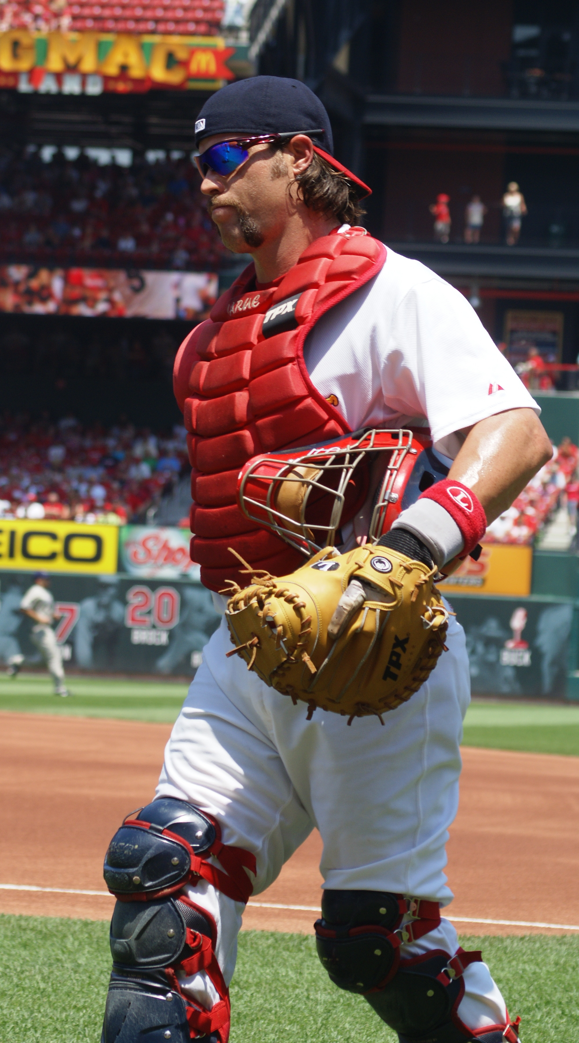 Jason LaRue